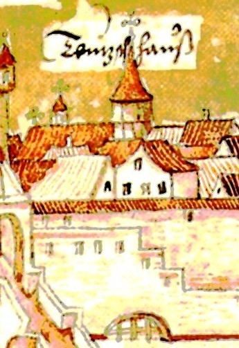 Deutschordensmünster in Heilbronn um 1557. Detail von File:Heilbronn 1557.jpg